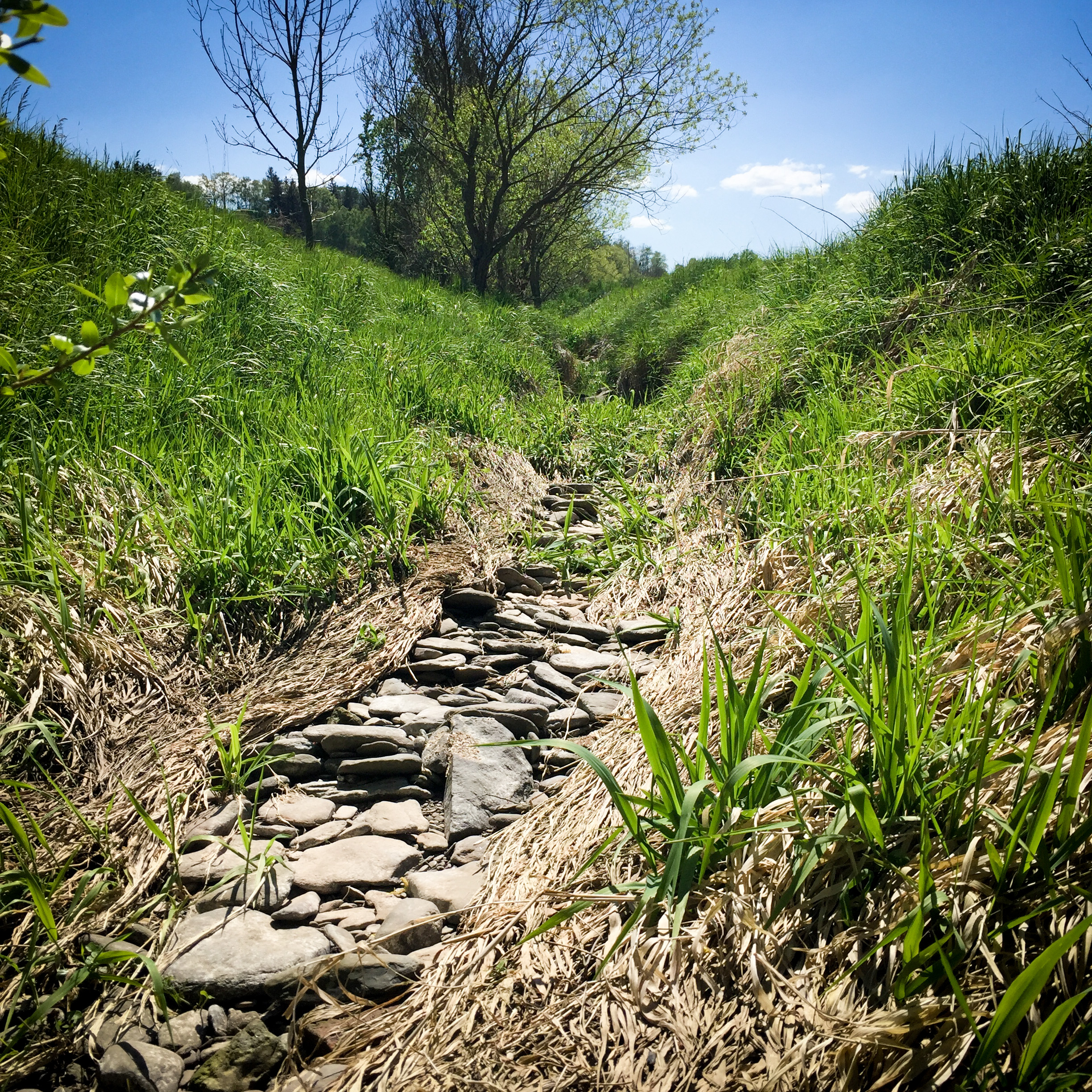 In der Nähe des Flächennaturdenkmals Drommberg bei Kolba (SOK): Der Dürrbach fließt unterirdisch weiter